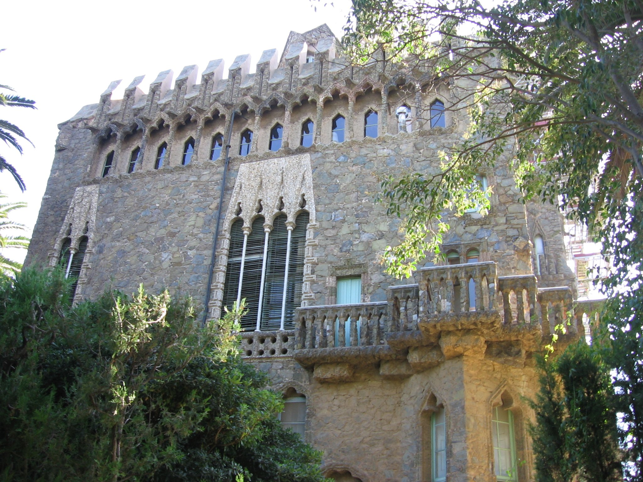 Torre Bellesguard, de Antoni Gaudí (Barcelona)